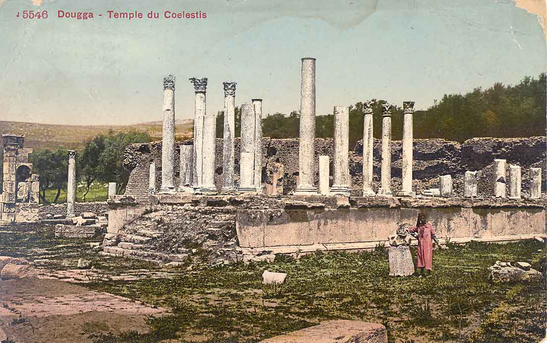 Le temple de Caelestis en 1900 Bertrand Bouret